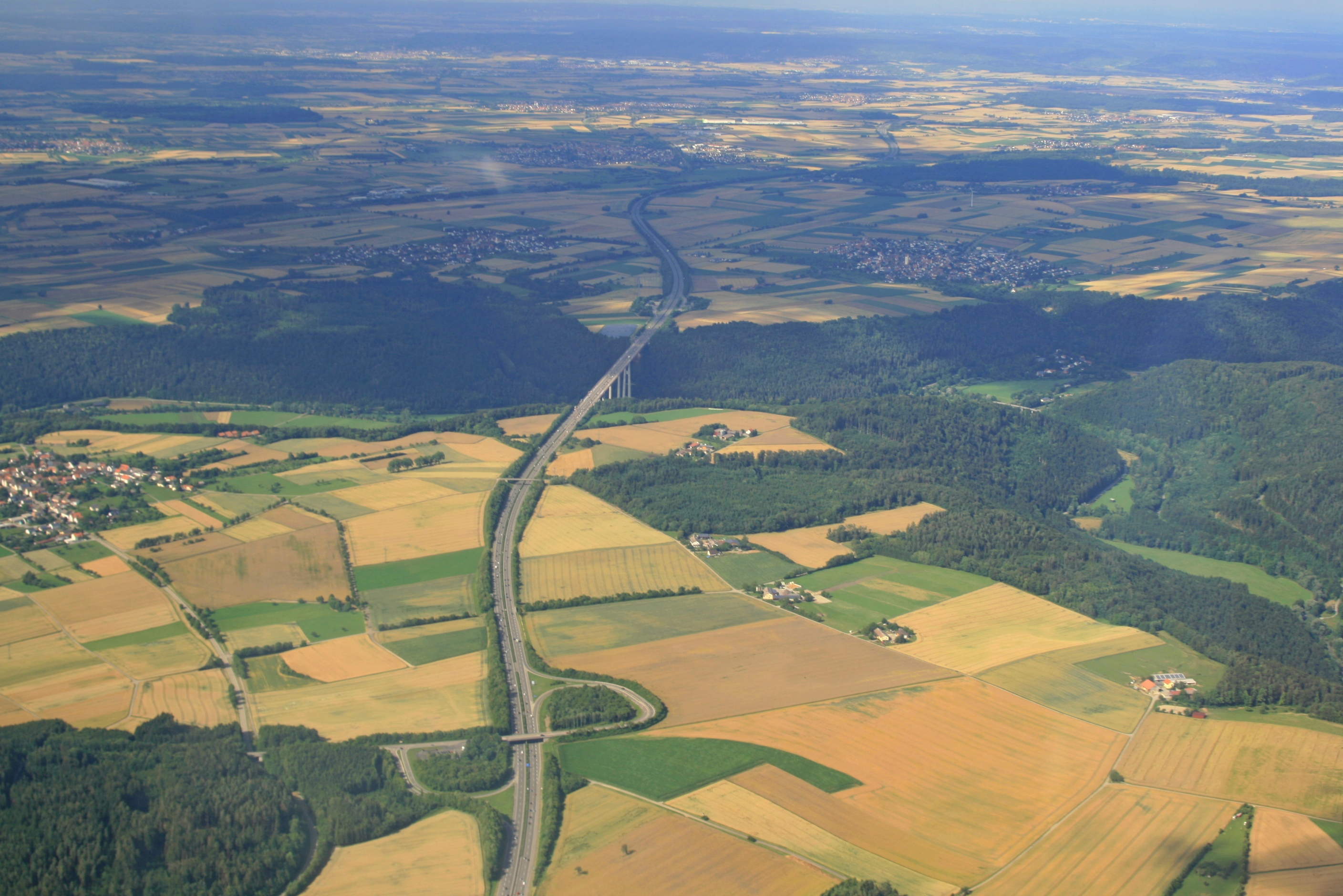 BAB 81 mit Anschlussstelle Horb am Neckar und Neckartalbrücke Weitingen.